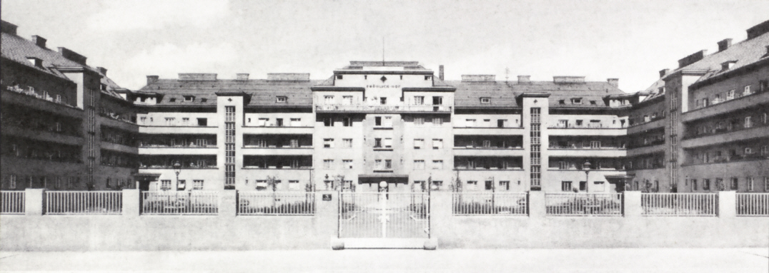 Wohnhausanlage Fröhlich-Hof in Wien-Meidling, 1930, Bezirksmuseum Meidling